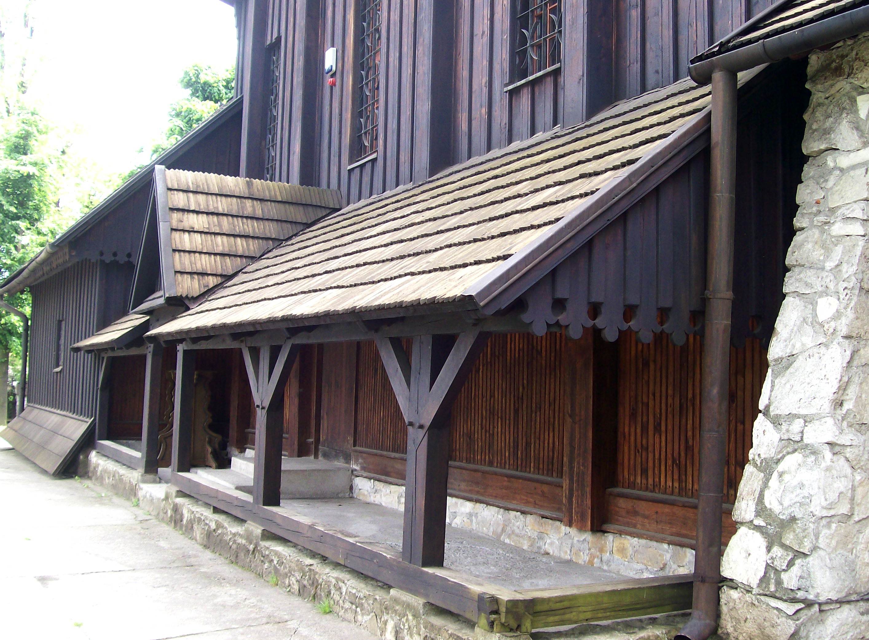 Nowosielce - kościół parafialny p.w. św. Marii Magdaleny